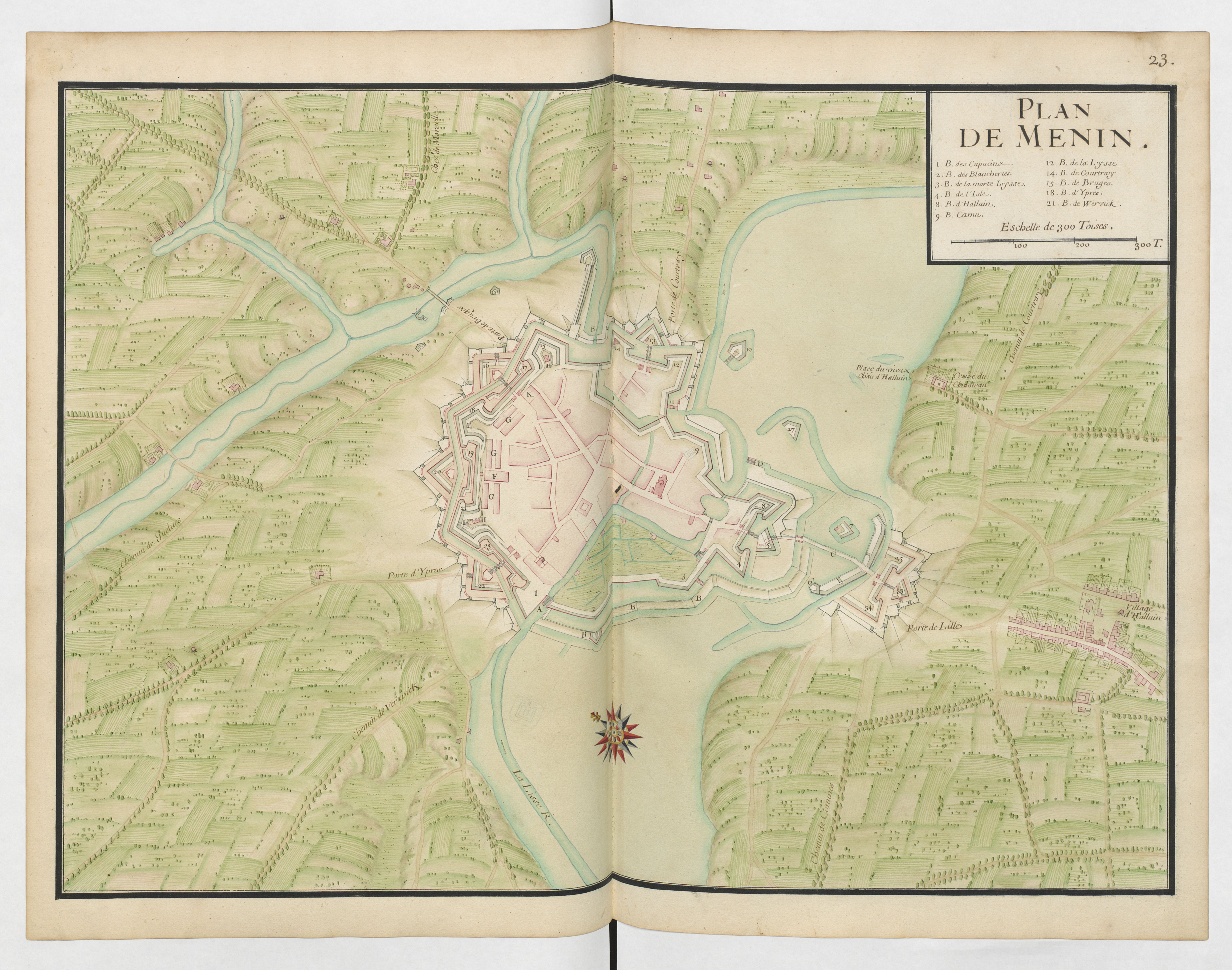 Ce document provient de l'ouvrage Recueil des plans des places du Royaume, divisées en provinces, faits en l'an 1693, Volume 1 : plan n°23. Ce bandeau n’indique rien sur le statut de l’œuvre au regard du droit d'auteur. Un bandeau de droit d’auteur est requis. Voir Commons:À propos des licences pour plus d’informations.